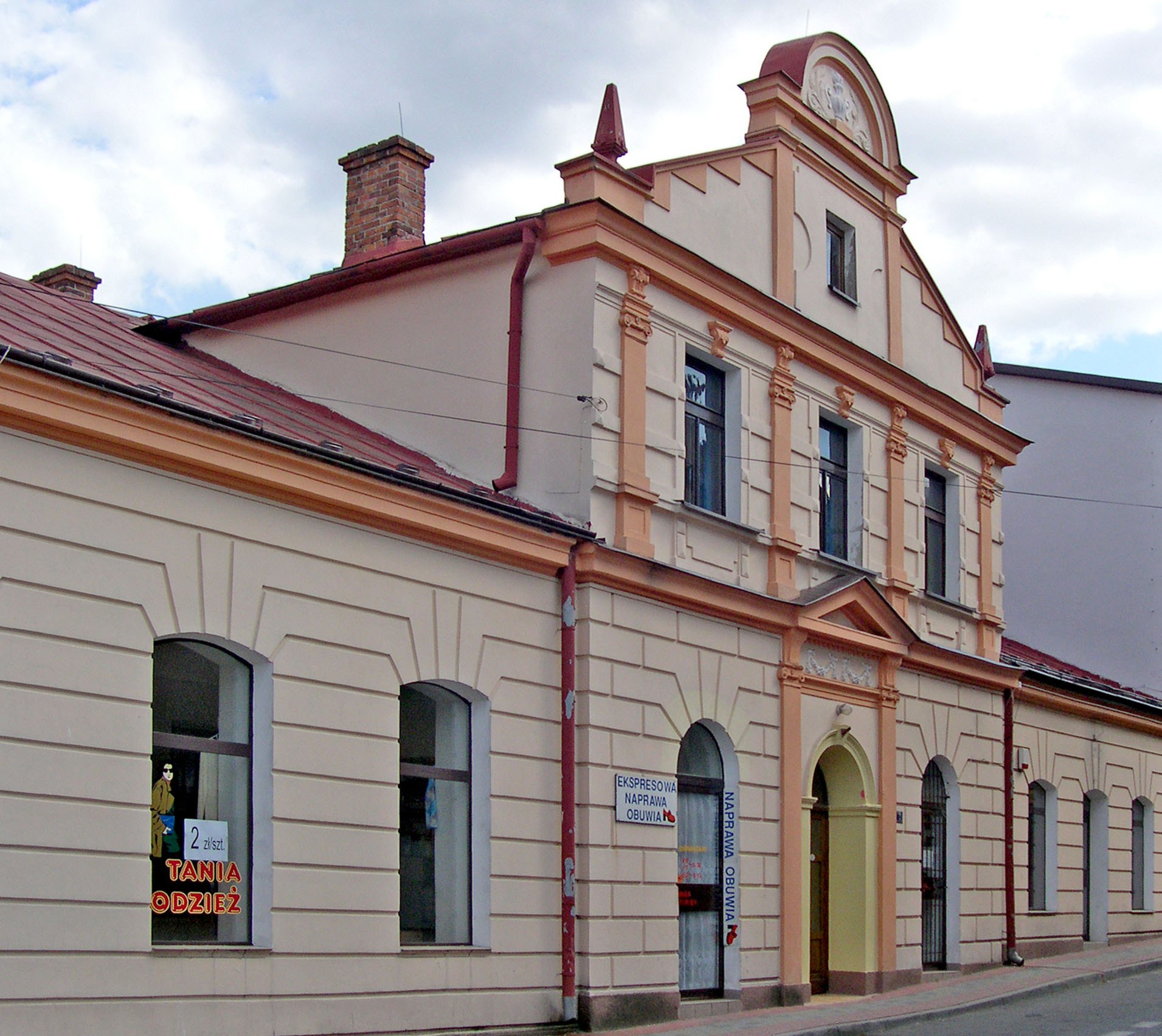 Synagogue in Brzesko